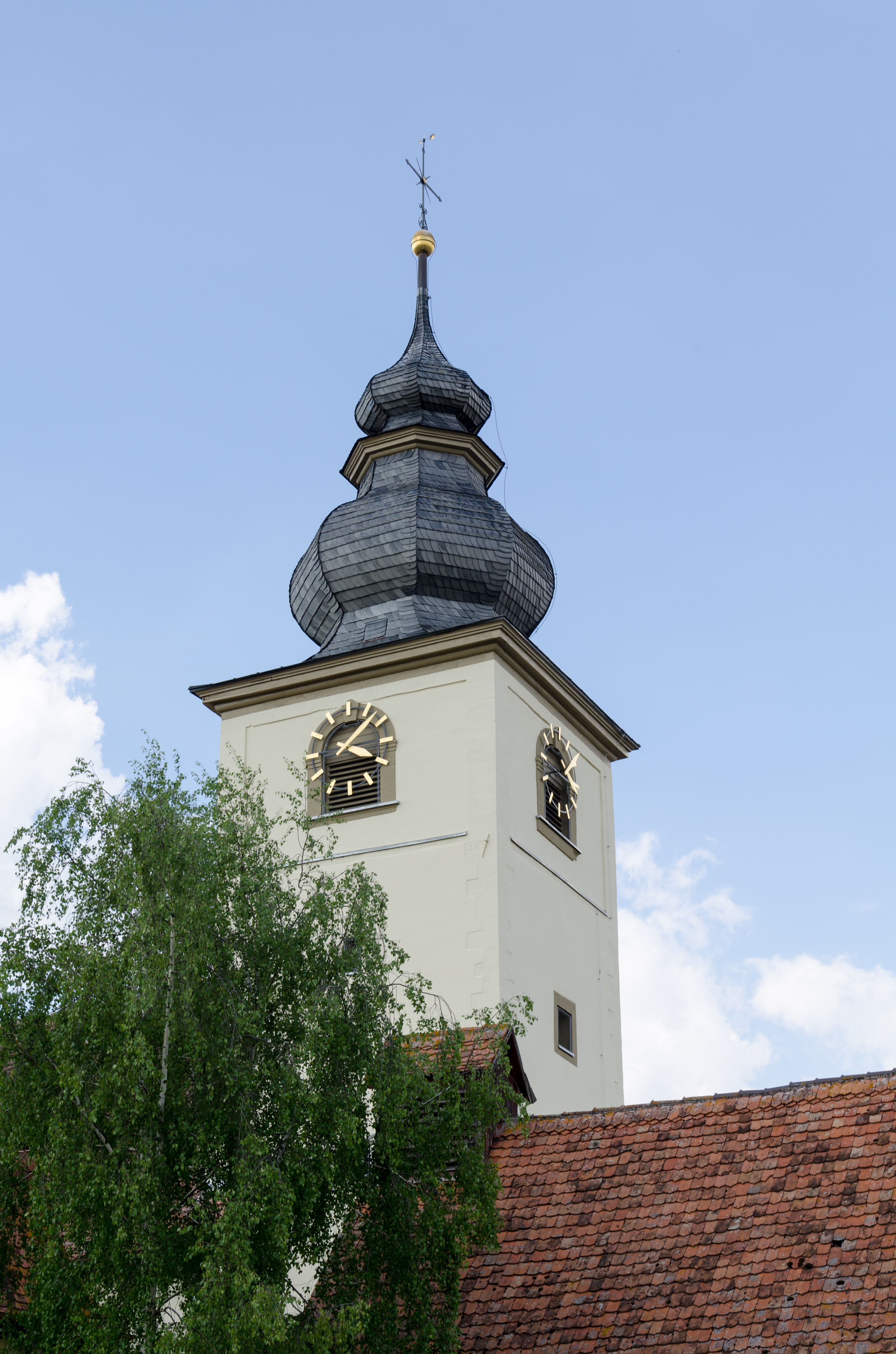 Markt Bibart, Altmannshausen, St. Jakobus major